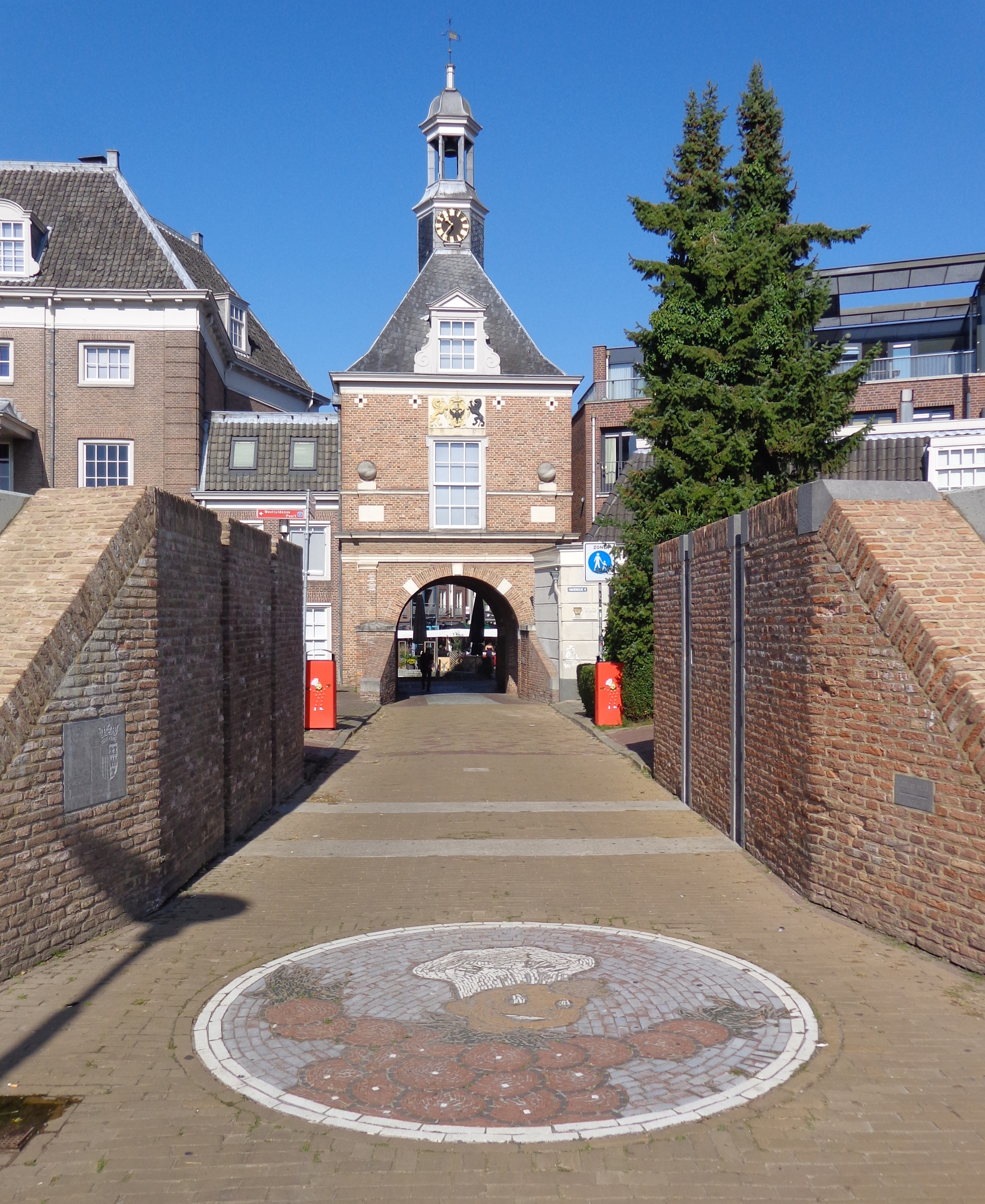 Waterpoort en Flipje-mozaiek te Tiel